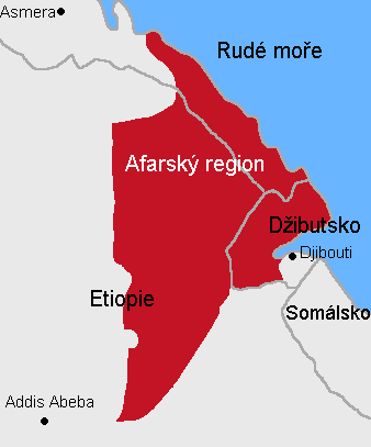 Mapa Afarského regionu v Etiopii